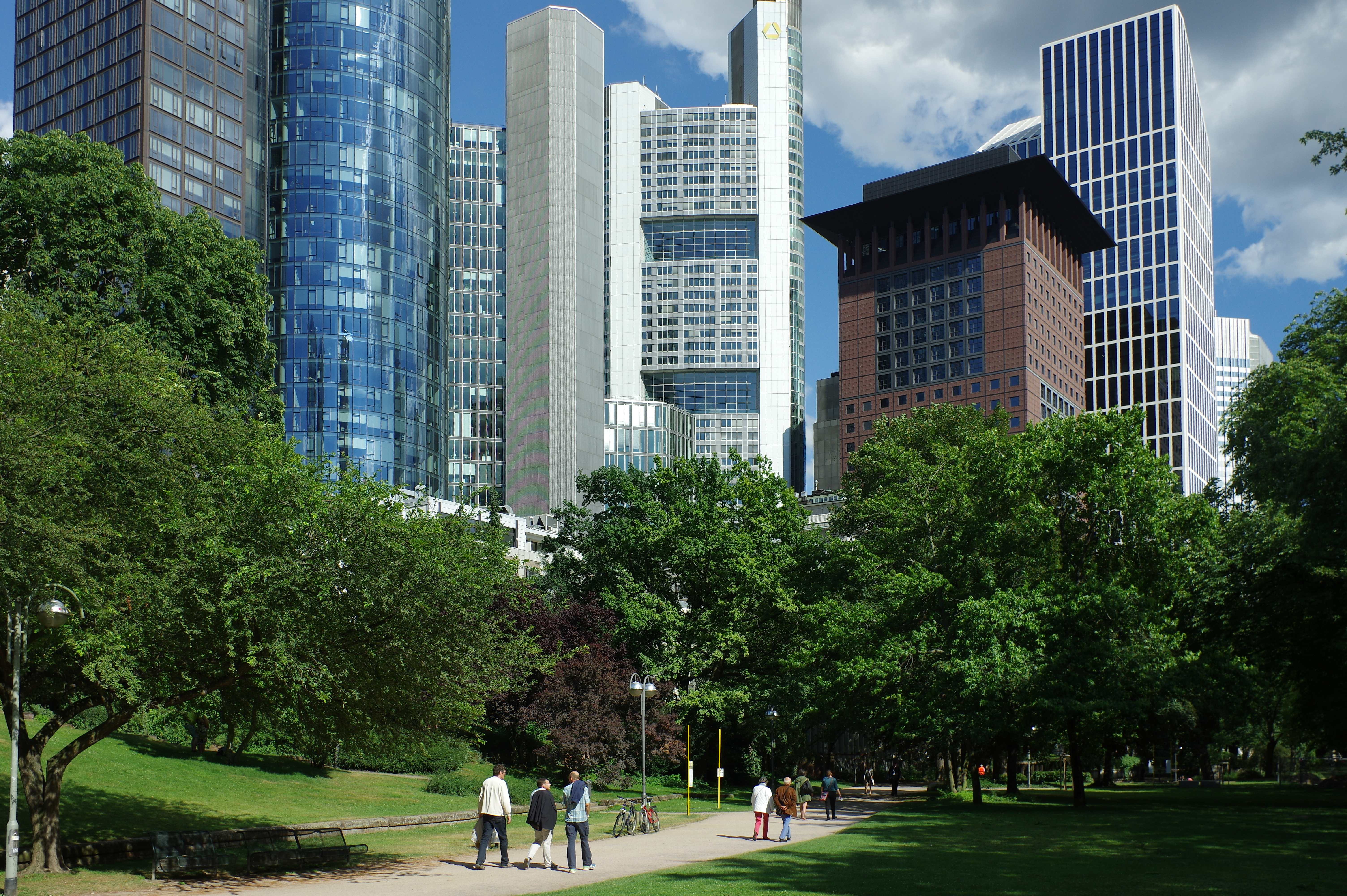 Frankfurt am Main, Taunusanlage mit Hochhäusern